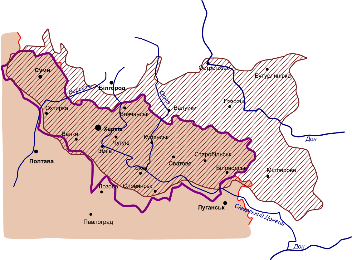 Штрихами обозначен регион Слобожанщина, тогда как синей линией выделена Слободская губерния.